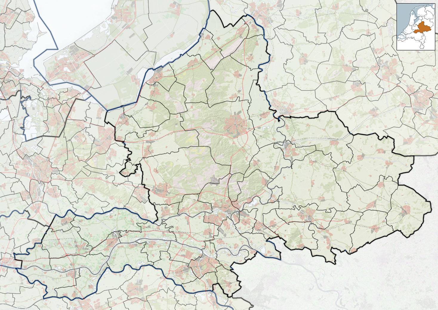 Referentiekaart van Provincie Gelderland, met indeling van gemeenten (2010) en impressie van het landschap. Door Jan-Willem van Aalst, samengesteld uit publiek beschikbare geo-data: Referentie-ondergrond (kustlijn, steden, wegen) gerasterd uit de OpenStreet Map OSM. ( Inhoud is beschikbaar onder de Creative Commons Attribution-ShareAlike 3.0 license. Referentie-ondergrond op water bewerkt vanuit Gebruik is vrij met bronvermelding NLR en ESA. Vectorgrenzen van gemeenten en regio's vrij ter beschikking gesteld met dank aan cartografen van brandweerregio's Hollands-Midden en IJsselland; gerasterd in Photoshop. Hoogte-aanduidingen (reliëf) gerasterd uit de AHN Viewer ( gebruik is vrij met bronvermelding (c) AHN, Overige kenmerken op de kaart: eigen tekenwerk van Jan-Willem van Aalst, op basis van gerasterde gemeentegrenzen.